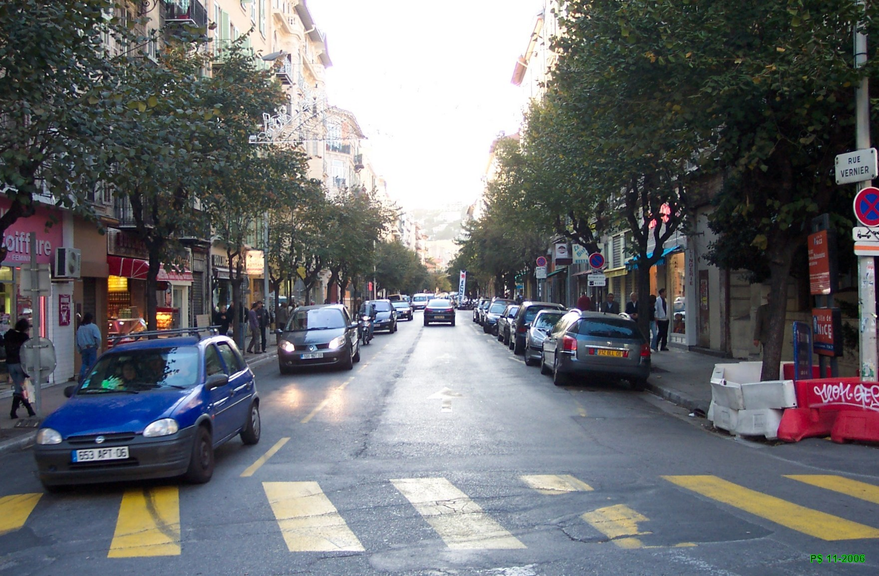 Nice-St-Etienne. Avennue Vernier direction W vers le bd Gambetta. Prise de vue vers 17h (le crépuscule).